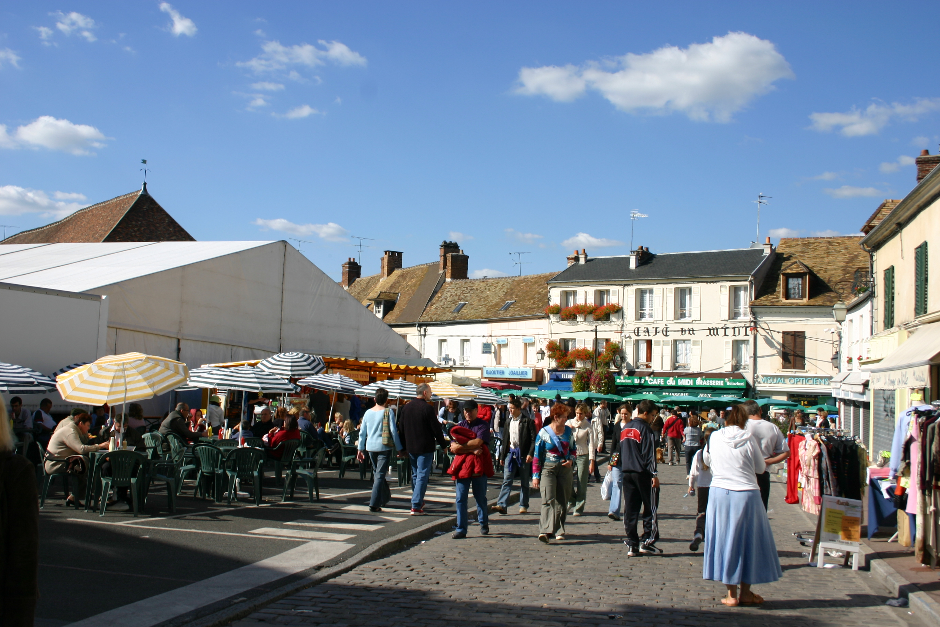 ©éréales Kille® ☺ 18 septembre 2005 à 20:02 (CEST)